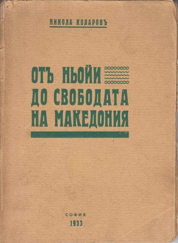 От Ньой до свободата на Македония